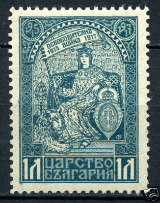 Пощенска марка от Първата световна война